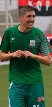 Zahir zerdab sous les couleurs de la JSMBejaia